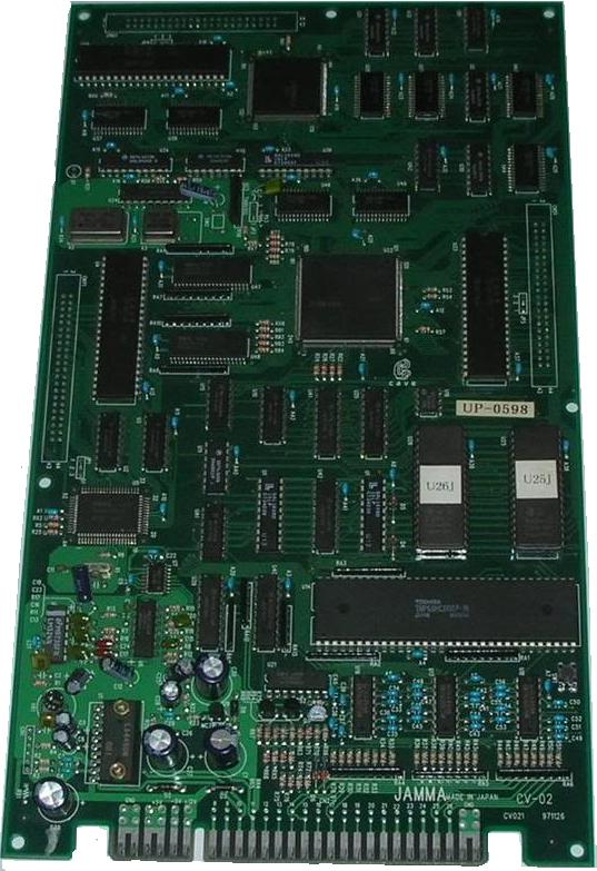 Uo Poko arcade PCB